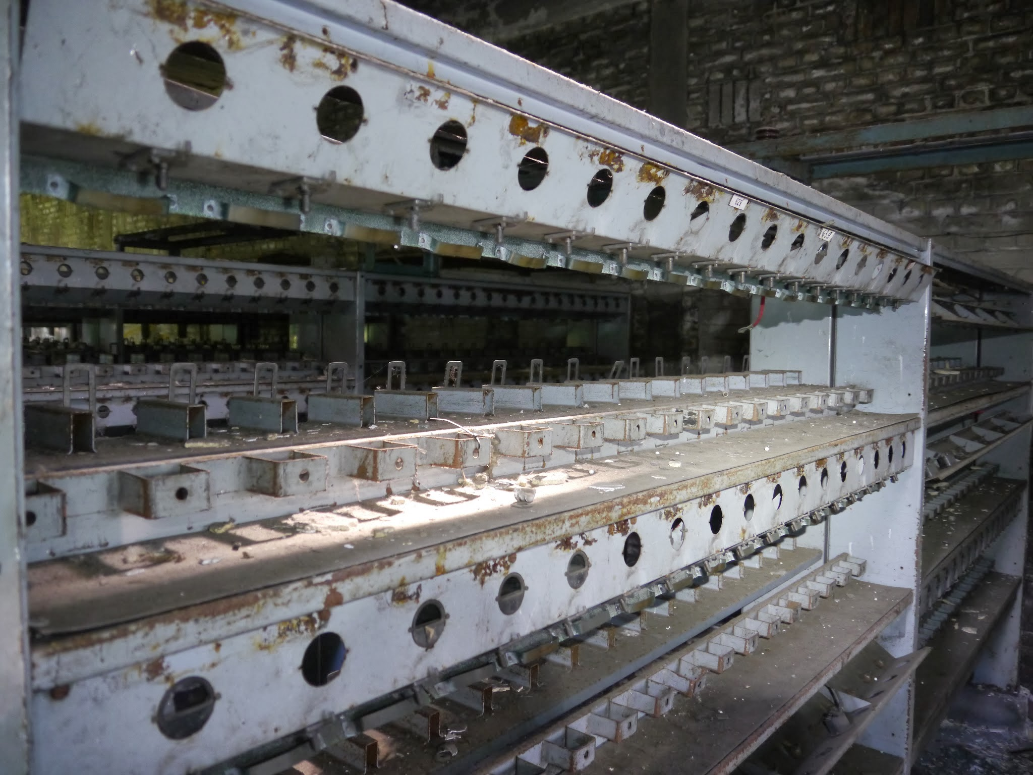 Bergbau Lampenstube an Cheratte Hazard